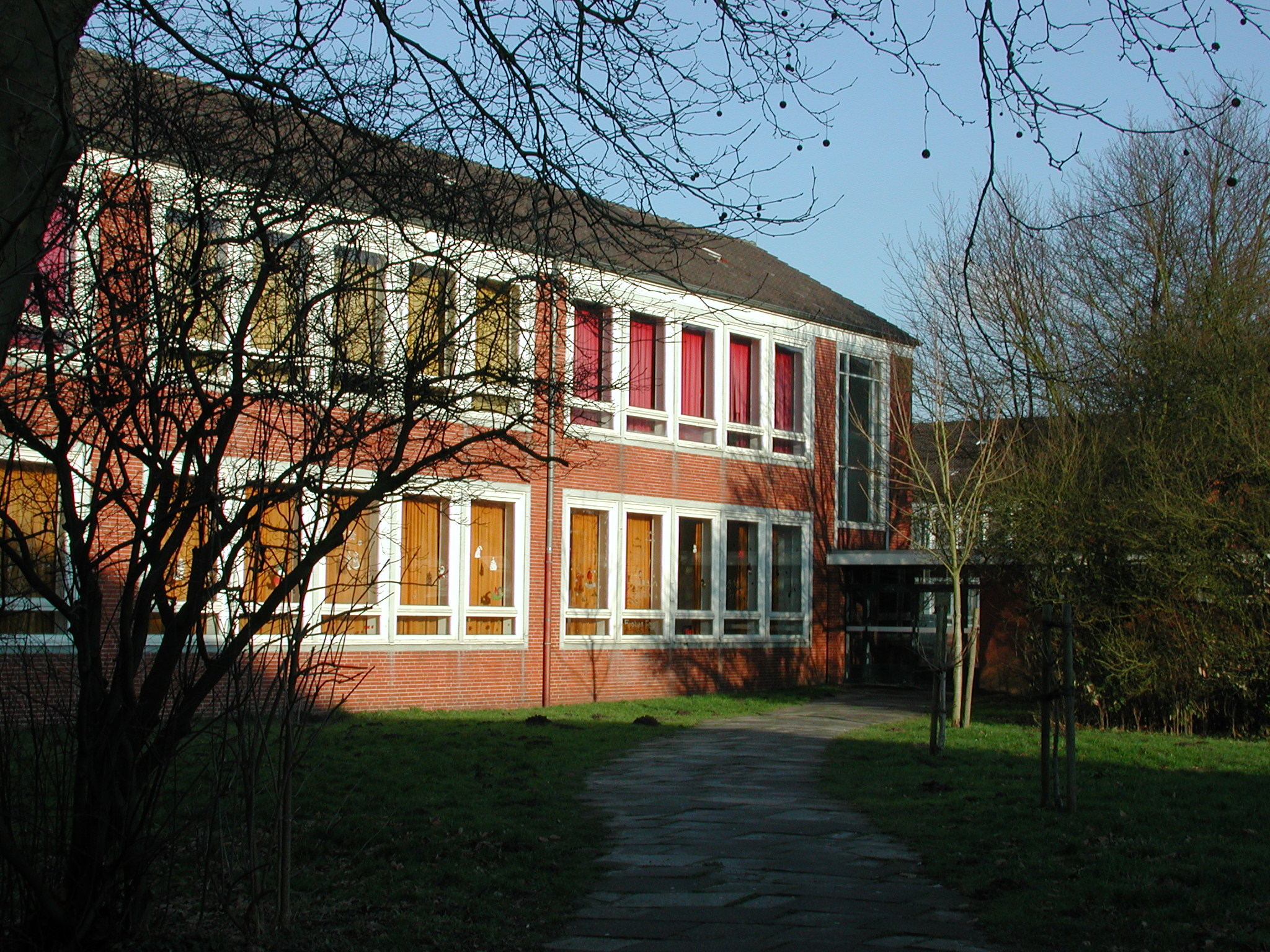 Rückansicht eines Gebäudes des Johannes-Althusisus-Gymnasiums Emden